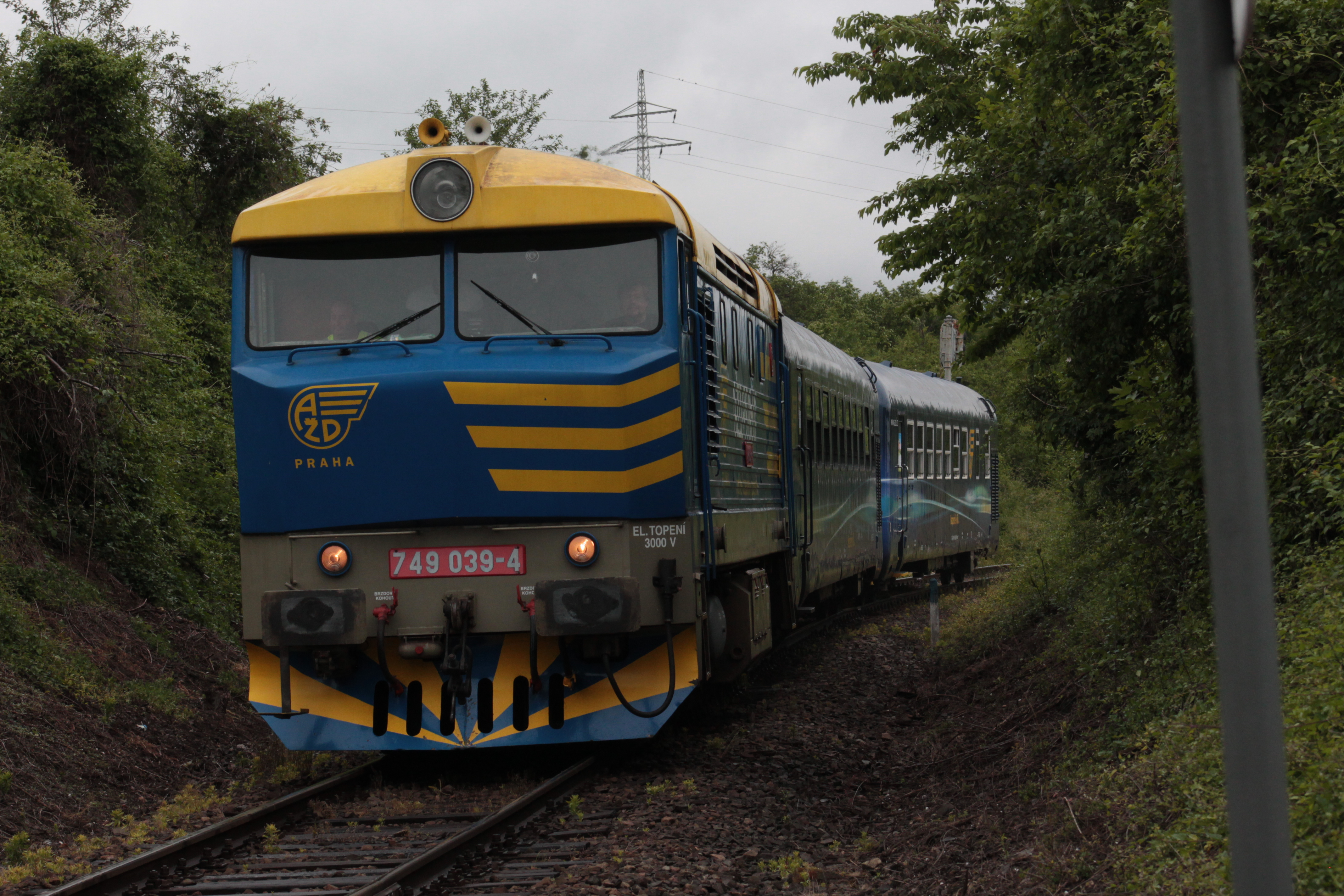 Lokomotiva 749 039-4 v záhlaví žst. Žalhostice